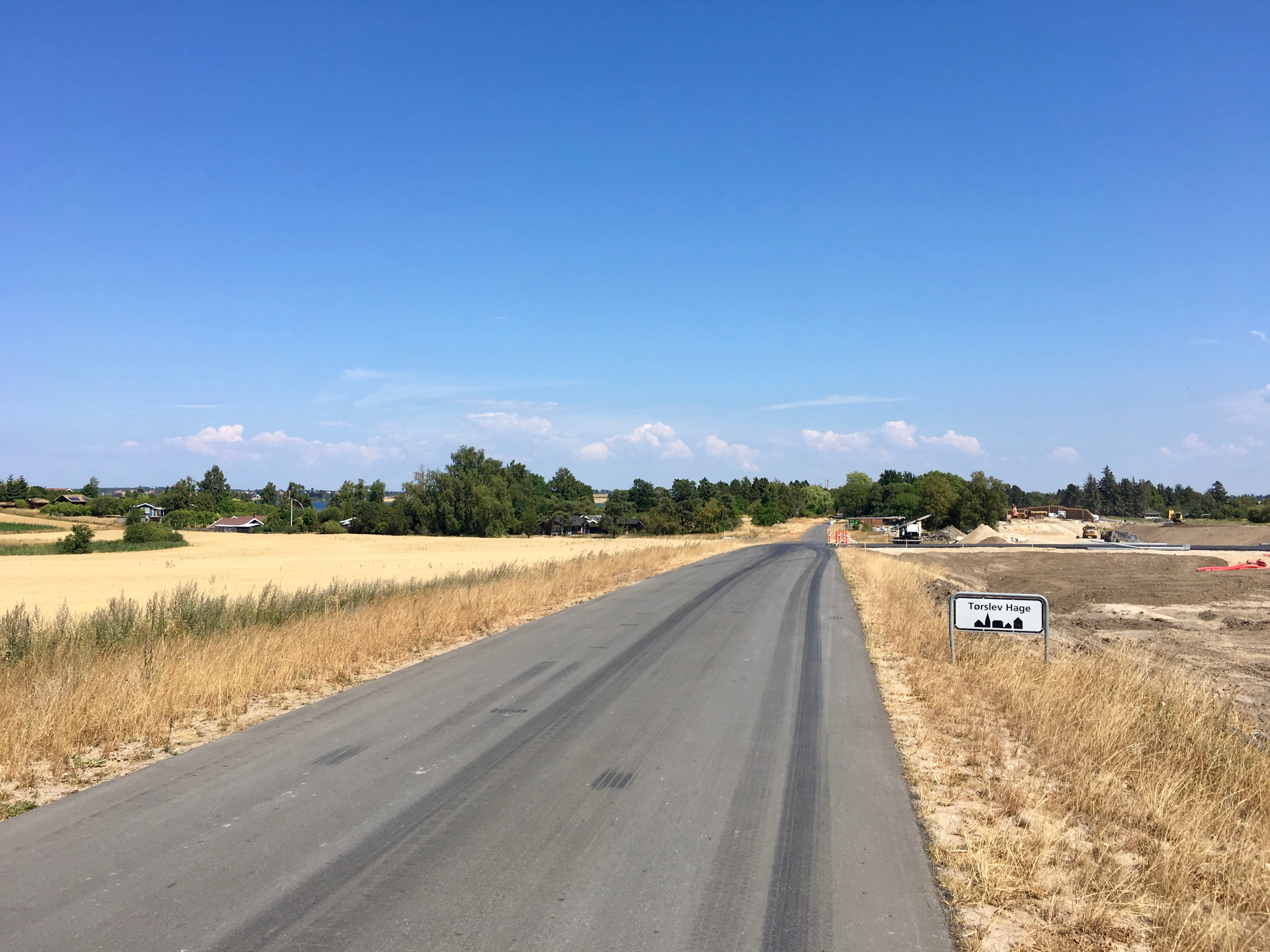 Tørslev Hage, Hornsherred, Sjælland